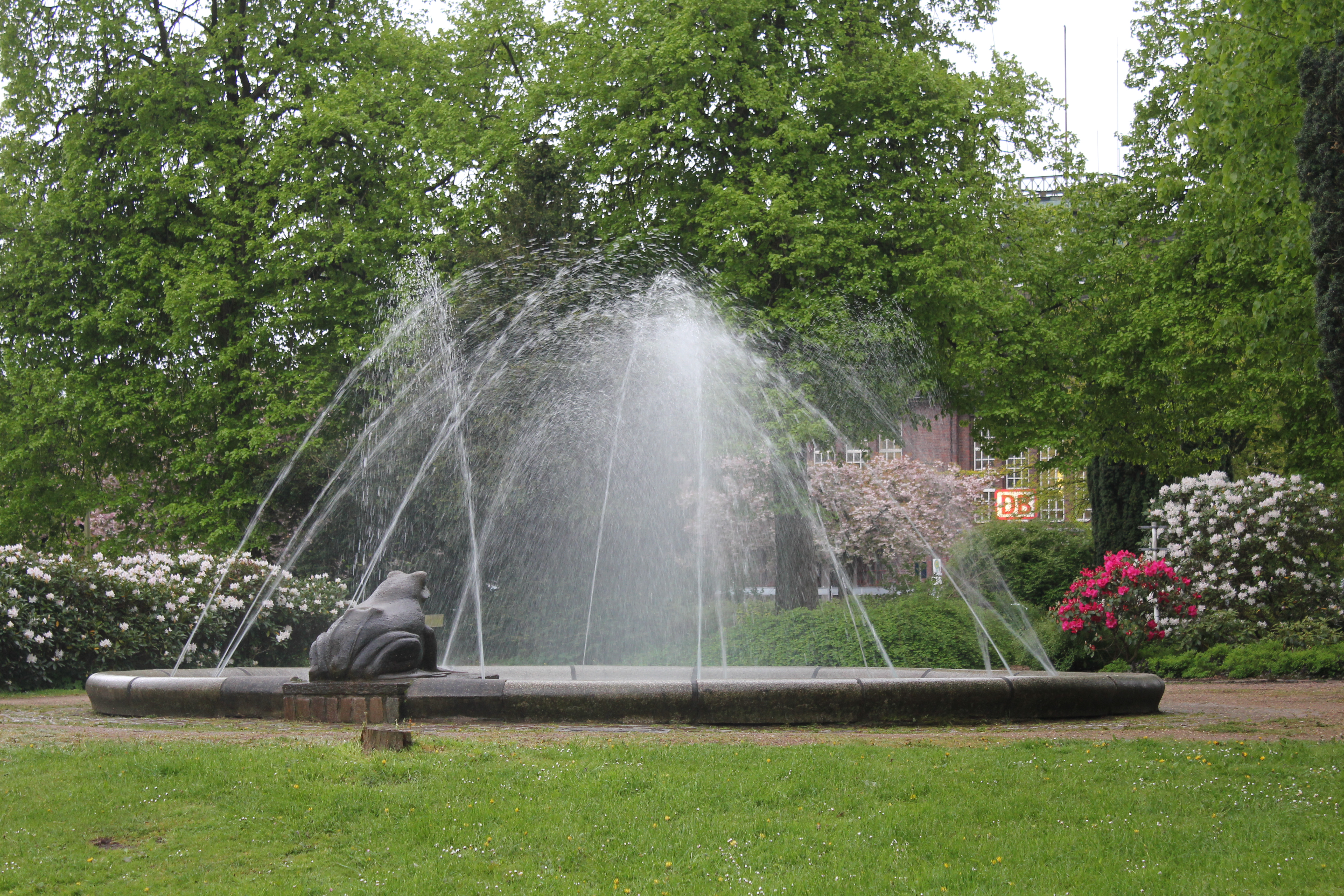 Der Froschbrunnen, Flensburg 2014, Tag an dem er in diesem Jahr in Betrieb genommen wird, Bild 01